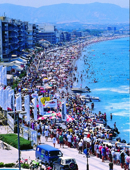 Vue de la plage de Loutraki, sur le golfe de Corinthe.